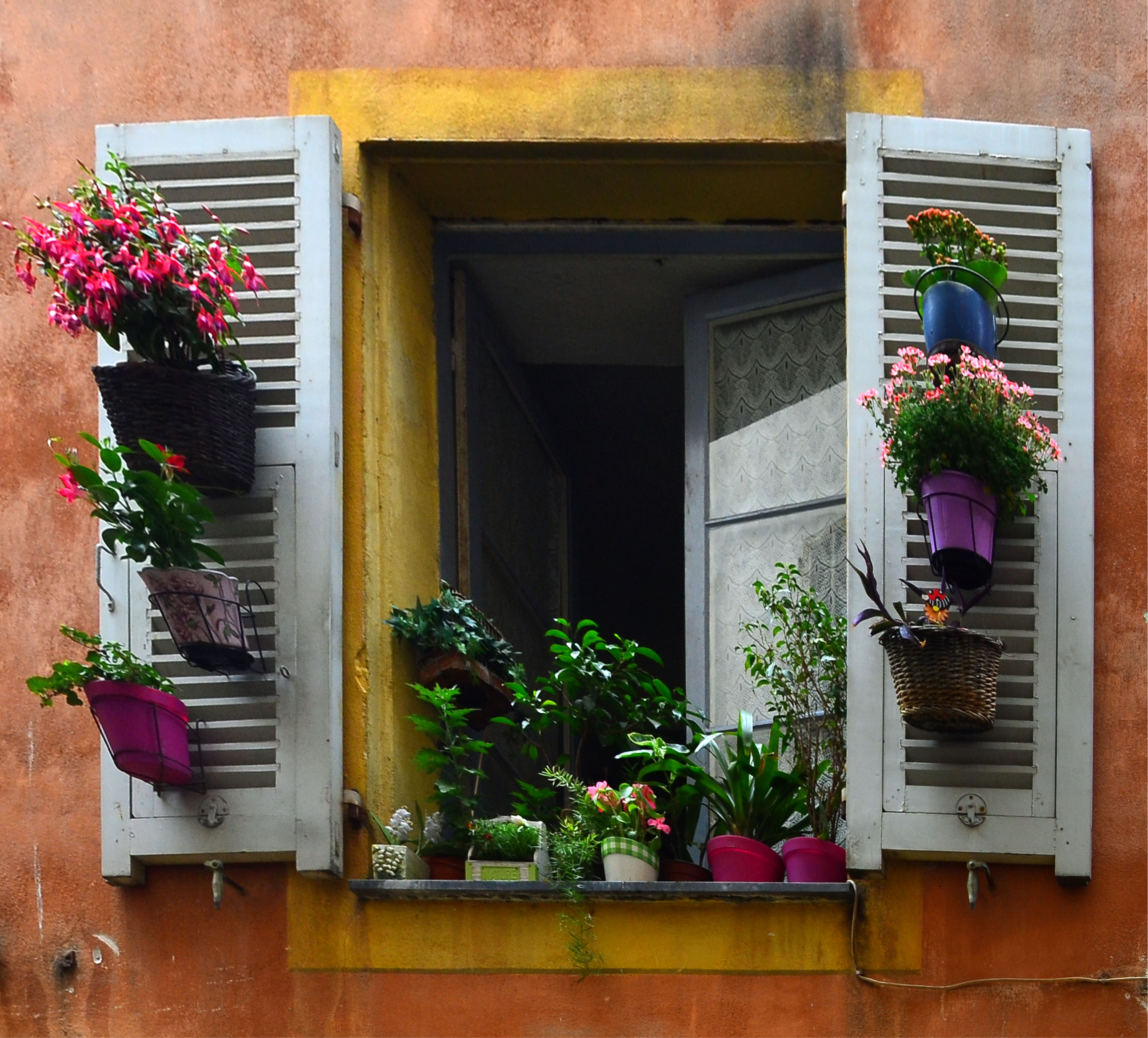 Vieux Nice (France)